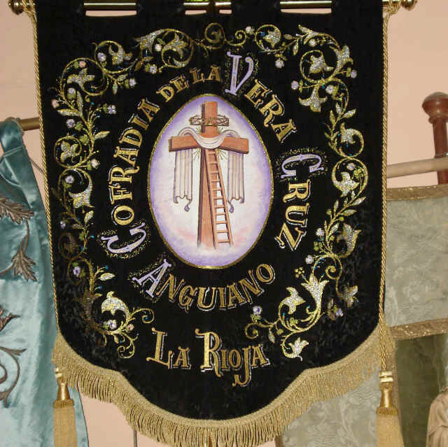 Pendón de la Cofradía de la Vera Cruz de Anguiano